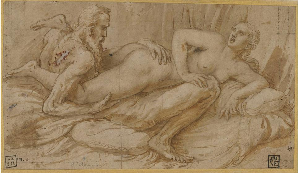 Dessin à l'encre et au fusain signé Giulio Romano exécuté vers 1525-1528 (?). Dim. : 130 x 206 mm.